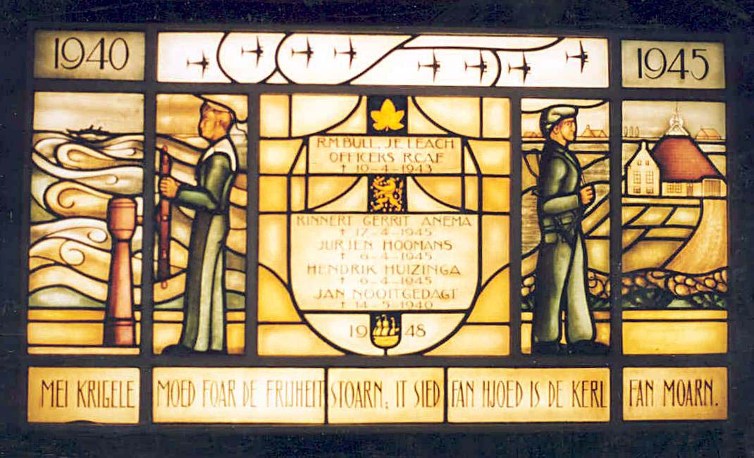 Julie Kropholler,1948. Beschrijving Gedenkraam_in_het_gemeentehuis_(IJlst): "Tijdens de Tweede Wereldoorlog kwamen vier inwoners van IJlst om: Nooitgedagts schip werd tot zinken gebracht, Hoomans en Huizinga werden gefusilleerd en Anema werd tijdens verzetsactiviteiten door een Duitse scherpschutter neergeschoten. Op 10 april 1943 stortte bij IJlst een Canadese Mosquito neer nadat zij werd aangeschoten, de piloot Leach en navigator Bull kwamen daarbij om het leven. Ter nagedachtenis aan deze zes slachtoffers werd door Julie Kropholler, zuster van architect Alexander Kropholler, een glas-in-loodraam ontworpen, dat werd vervaardigd door W.E. Vahrenkamp. Het werd op 29 juni 1948 onthuld. Het raam was aanvankelijk geplaatst in het stadhuis van de gemeente IJlst. IJlst ging later op in de gemeente Wymbritseradeel en Súdwest-Fryslân . In 1985 werd het gedenkraam overgebracht naar het nieuwe gemeentehuis aan de Stadslaan." Tekst bovenaan: "1940 - 1945" Tekst in het midden: R.M. Bull J.E. Leach 10 - 4 - 1943 Rinnert Gerrit Anema 17 - 4 - 1945 Jurjen Hoomans 6 - 4 - 1945 Hendrik Huizinga 6 - 4 - 1945 Jan Nooitgedagt 14 - 5 - 1940 1948 Friese tekst onderaan: Mei krigele - Moed foar de frijheit - Stoarn: it sied - Fan hjoed is de kerl - Fan moarn.